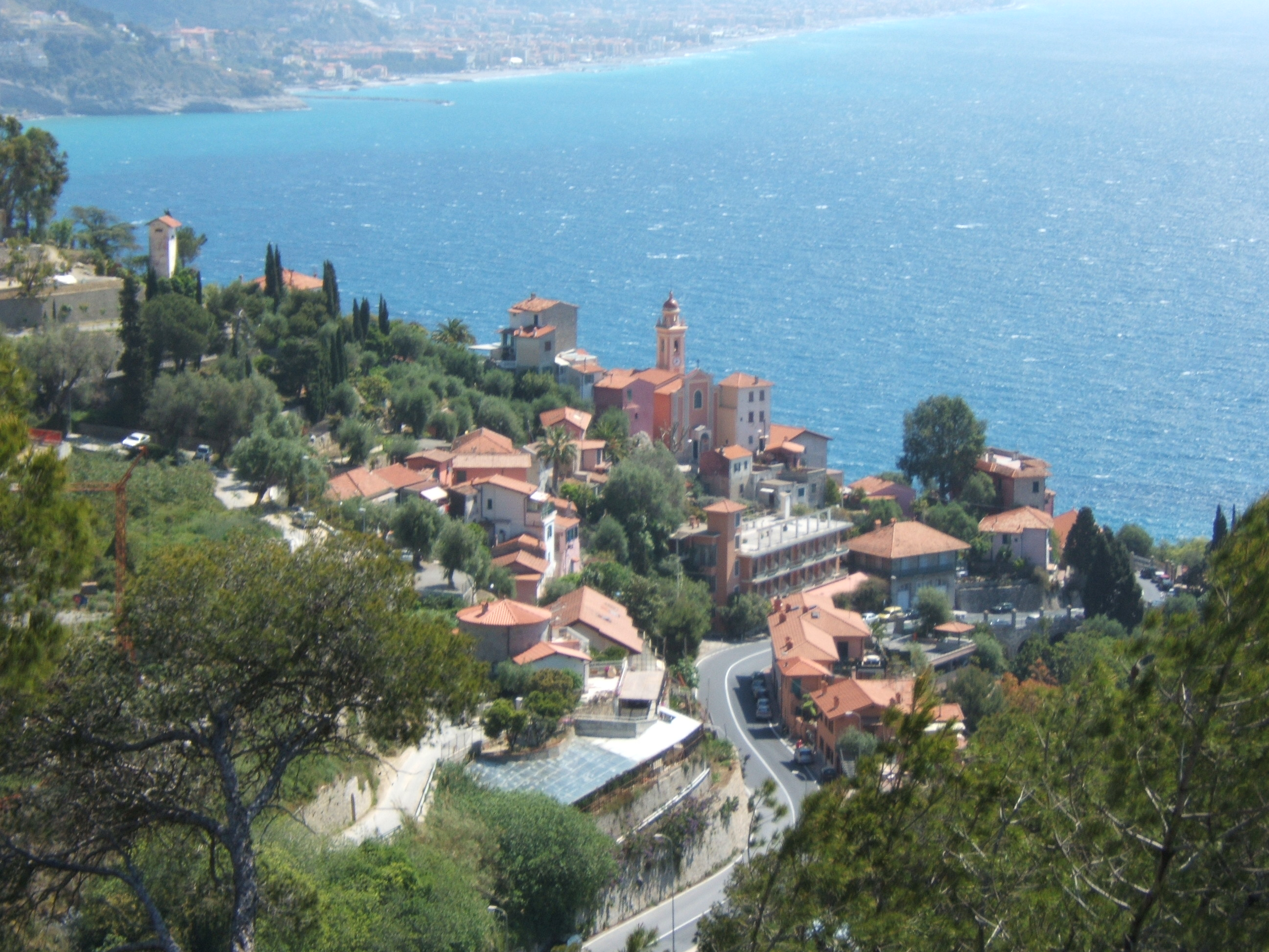 Le village de Mortola Inferiore en Italie, entre Vintimille et la frontière française.